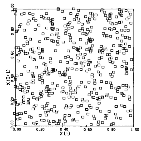 Результат работы регистра сдвига с обобщенной обратной связью